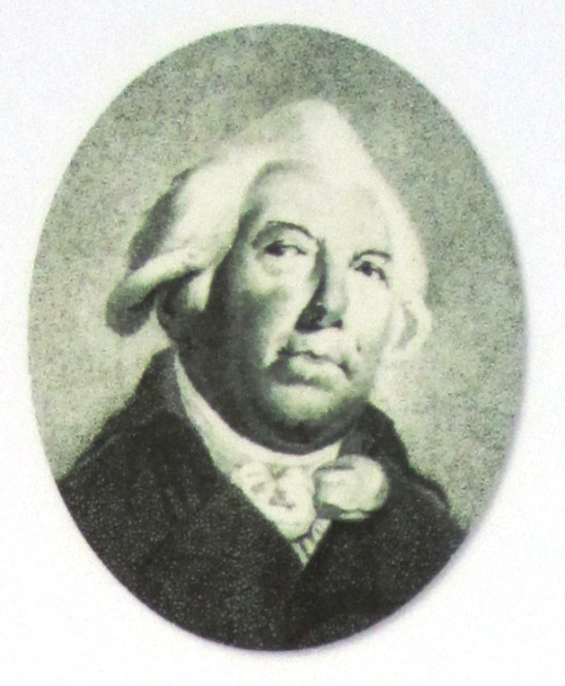 Paul Heinrich Trummer (1722–1808)